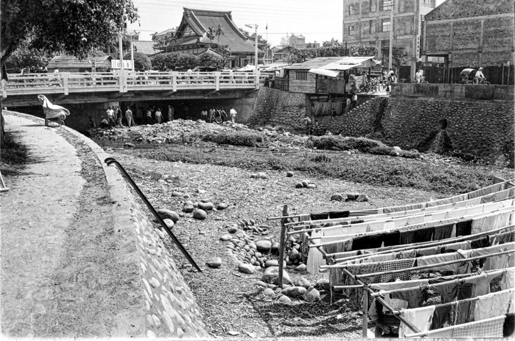 柳川，後方高聳宮殿式建築為中尊寺，於攝影不久後遭拆除重建為臺中市中區區公所；該河流也在數年後被封閉加蓋。